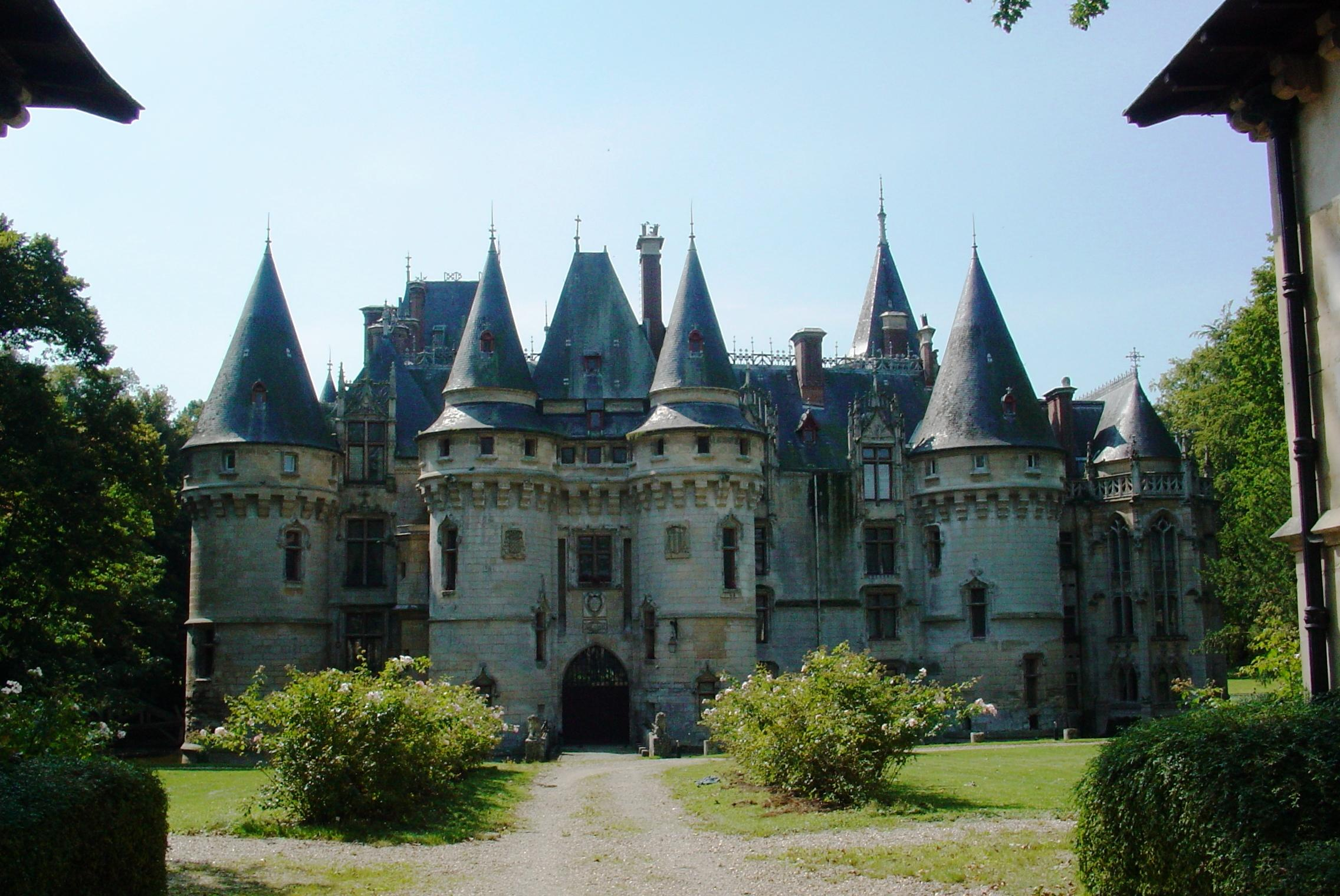 entrée (nord) du chateau de Vigny.